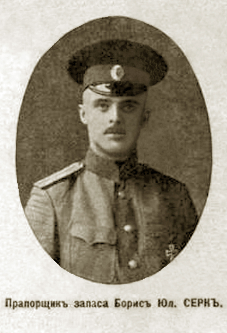 Прапорщик Борис Серк Вырезка из иллюстрированного приложения к газете "Новое время" № 13789 от 2 (15) августа 1914 г.